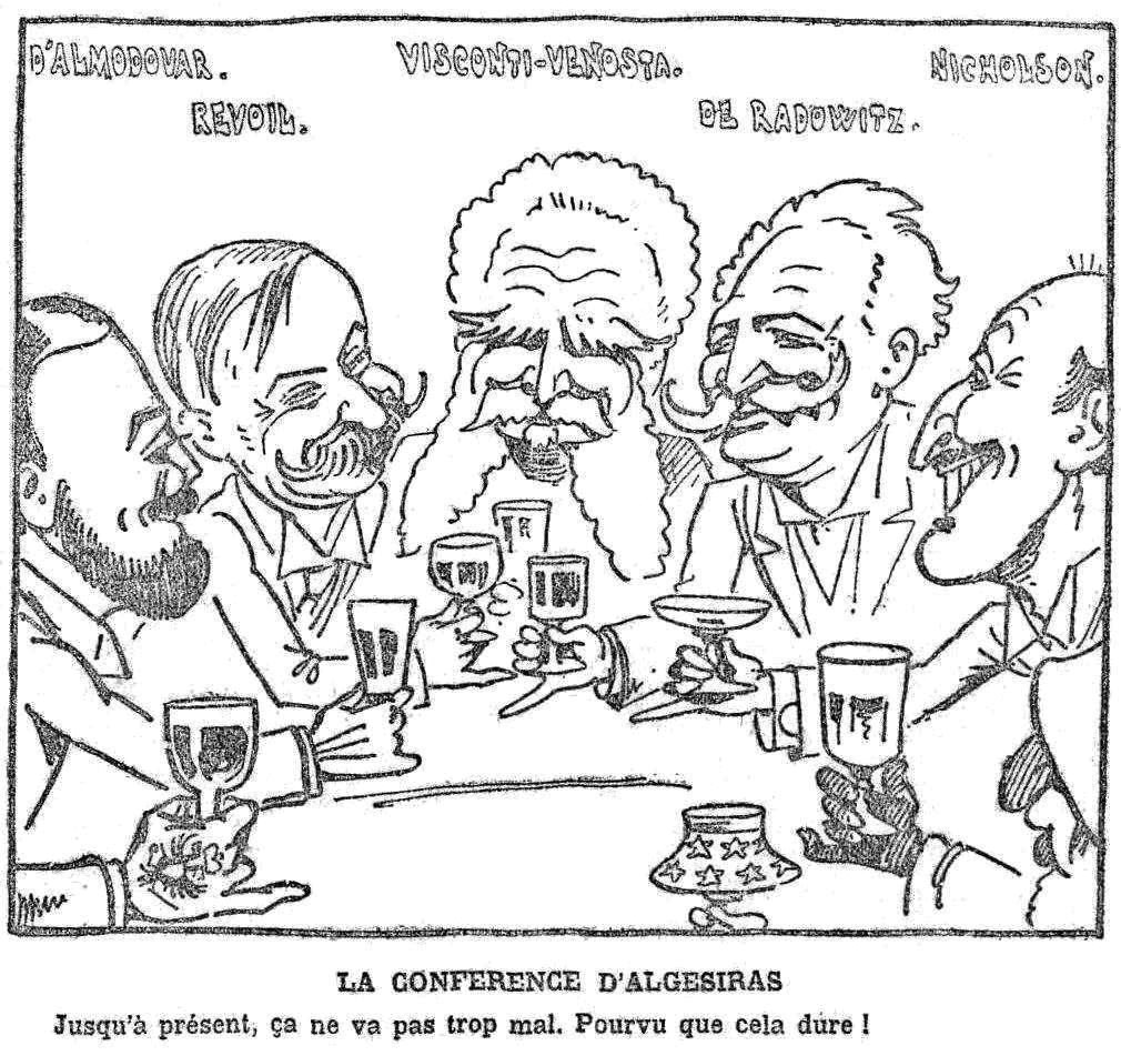 Caricature de Moloch à propos de la Conférence d'Algésiras.